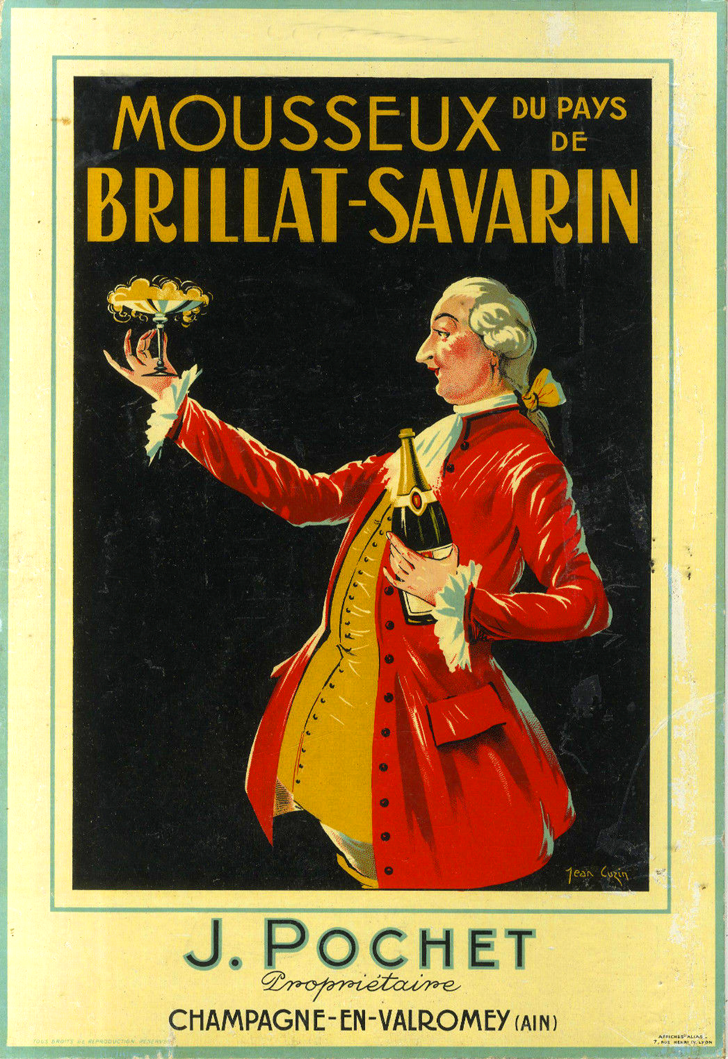 IGP Ain Valromey mouseux